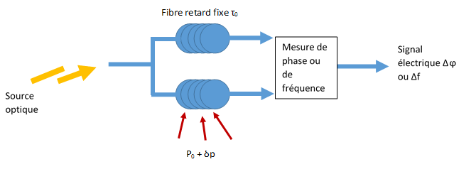 L’onde sonore entraîne des variations de pression dans son milieu de propagation et donc un déphasage de cette onde lorsqu’elle se propage dans la fibre optique.